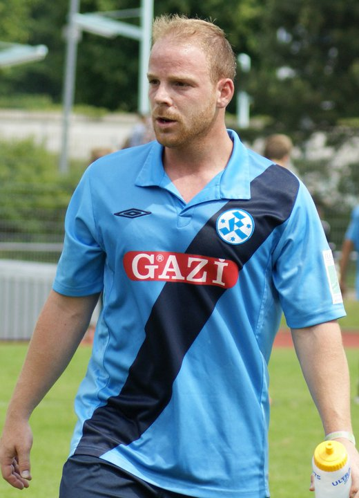 Dirk Prediger im Trikot der Stuttgarter Kickers